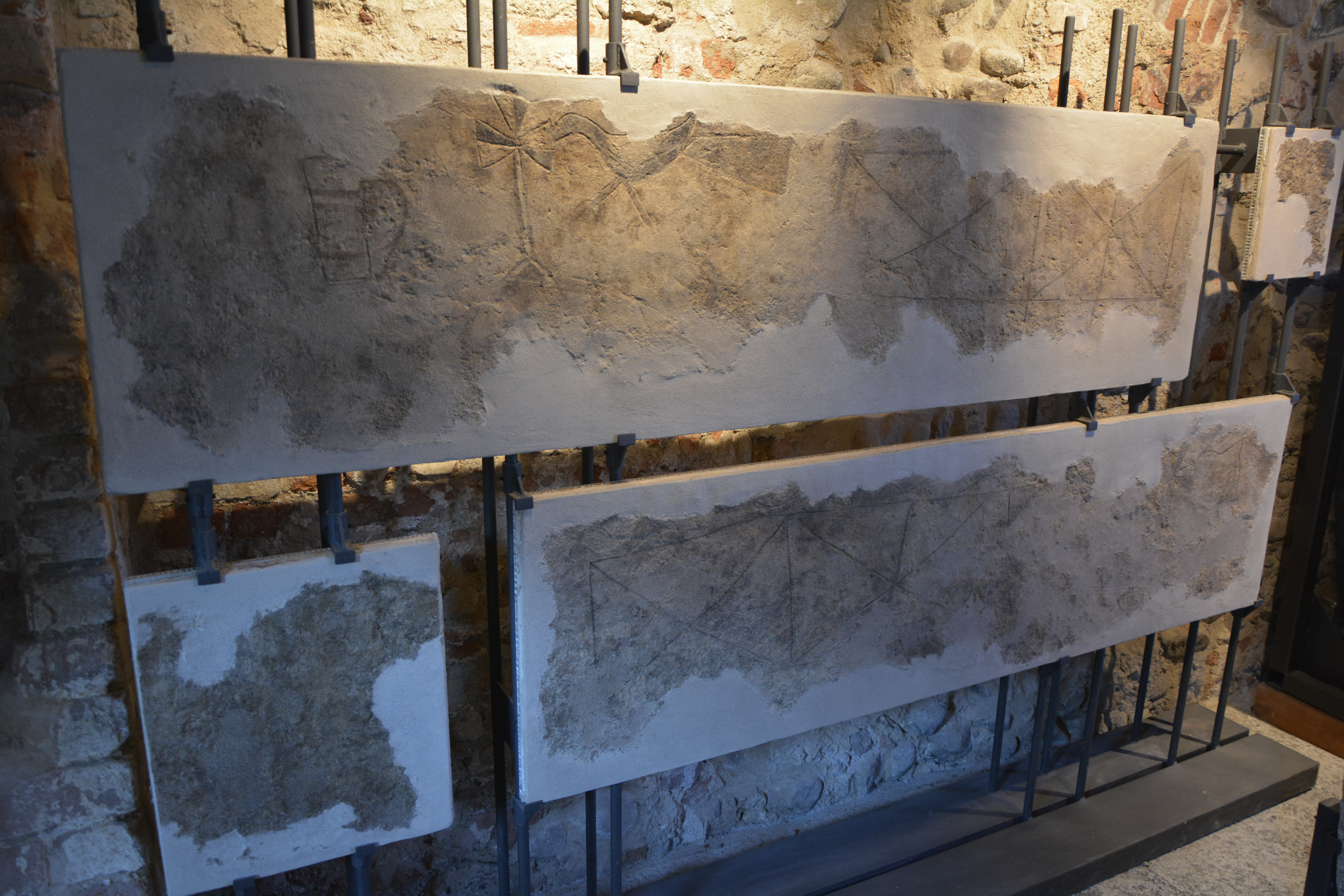 Dipinti interni di una tomba a vasca nel monastero di Cairate, in provincia di Varese.